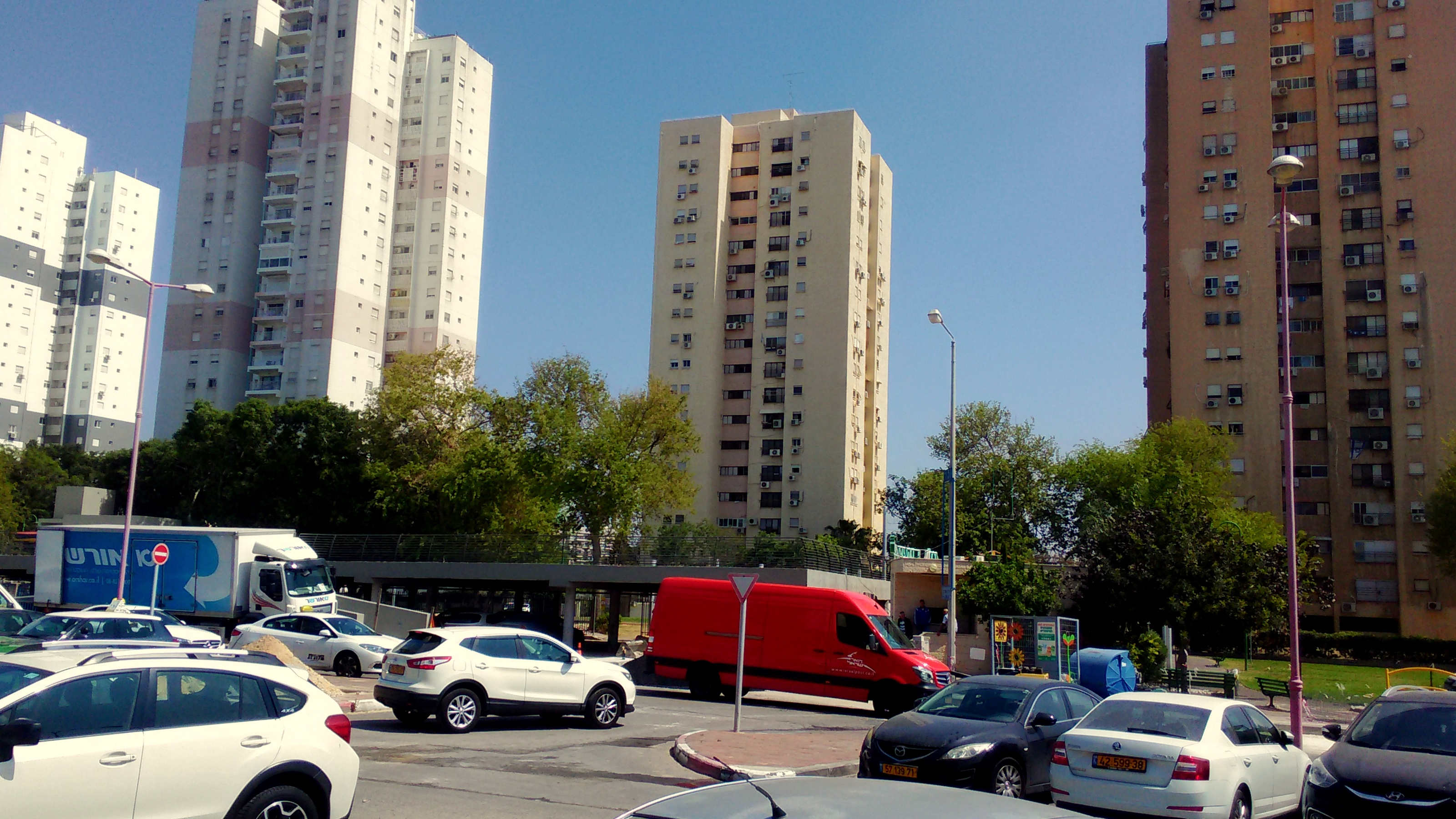 מגדלי מגורים בעיר